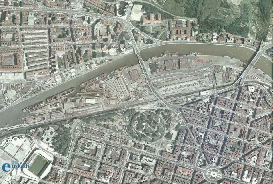 Euskalduna ontziolaren ikuspegia, 1983an.